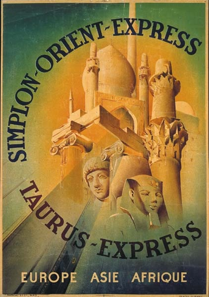 Compagnie Internationale des Wagons-Lits poster for Venice-Simplon-Express / Taurus-Express.